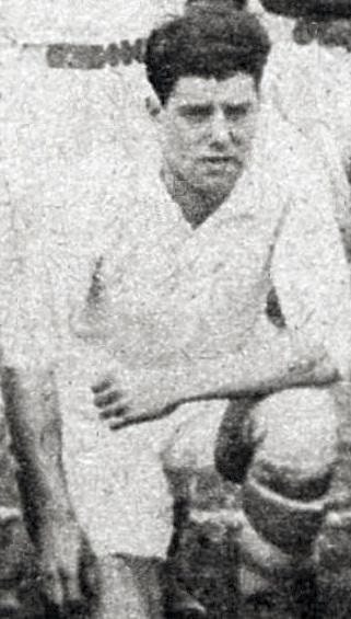 Jean Boyer en 1926 (Olympique de Marseille).